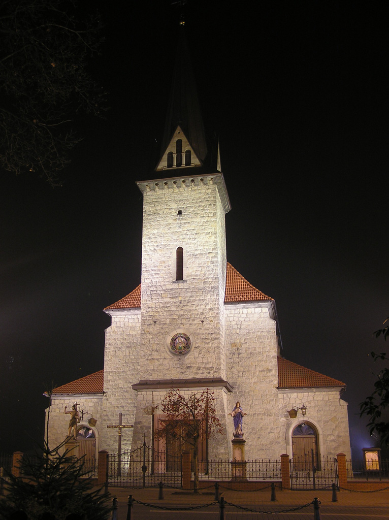 Kościół pw. Matki Bożej Wspomożenia Wiernych w Dobczycach. Zdjęcie wykonane nocą.